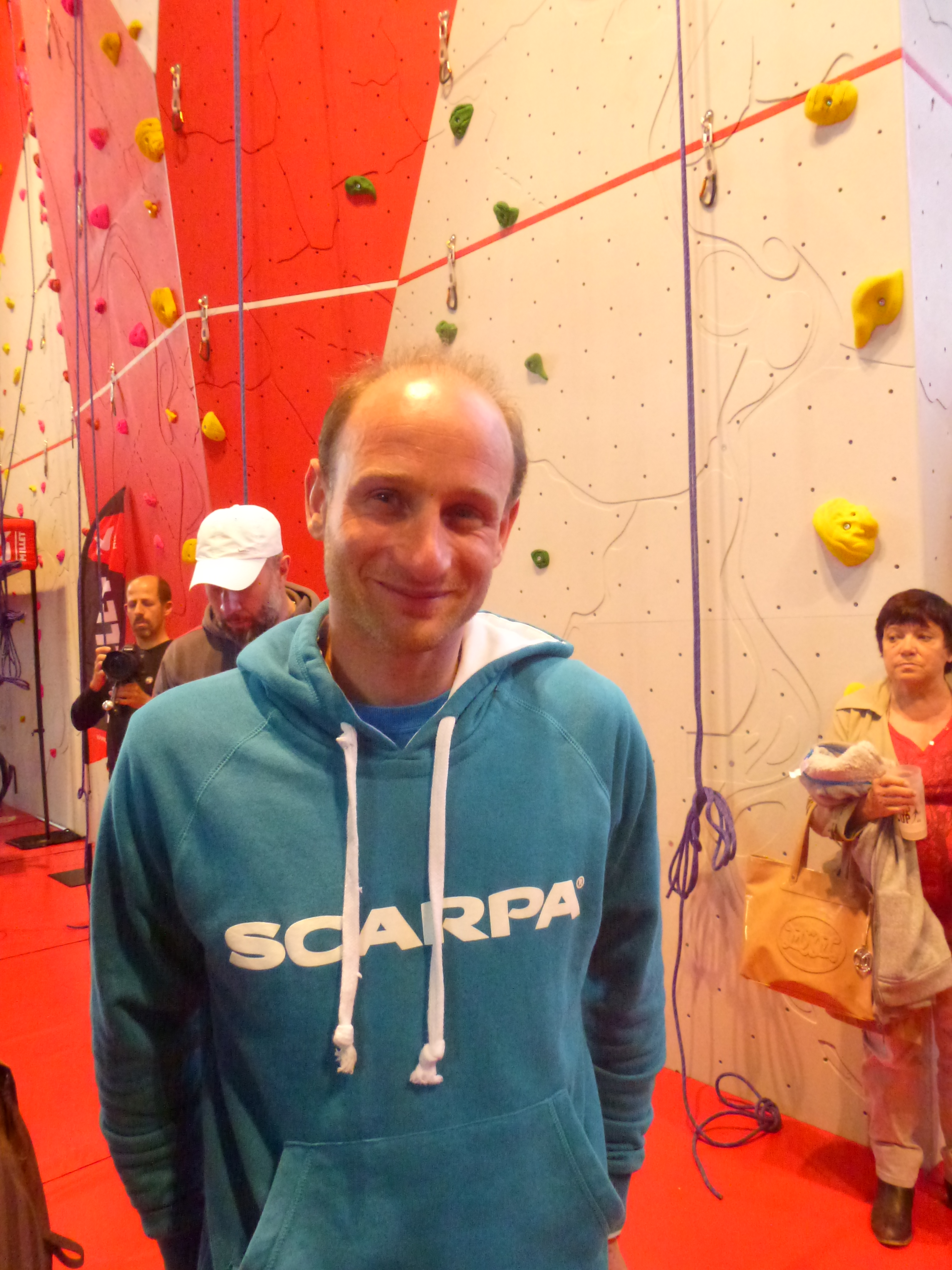 Cédric Lachat, le 2 avril 2015 à Climb Up Aix